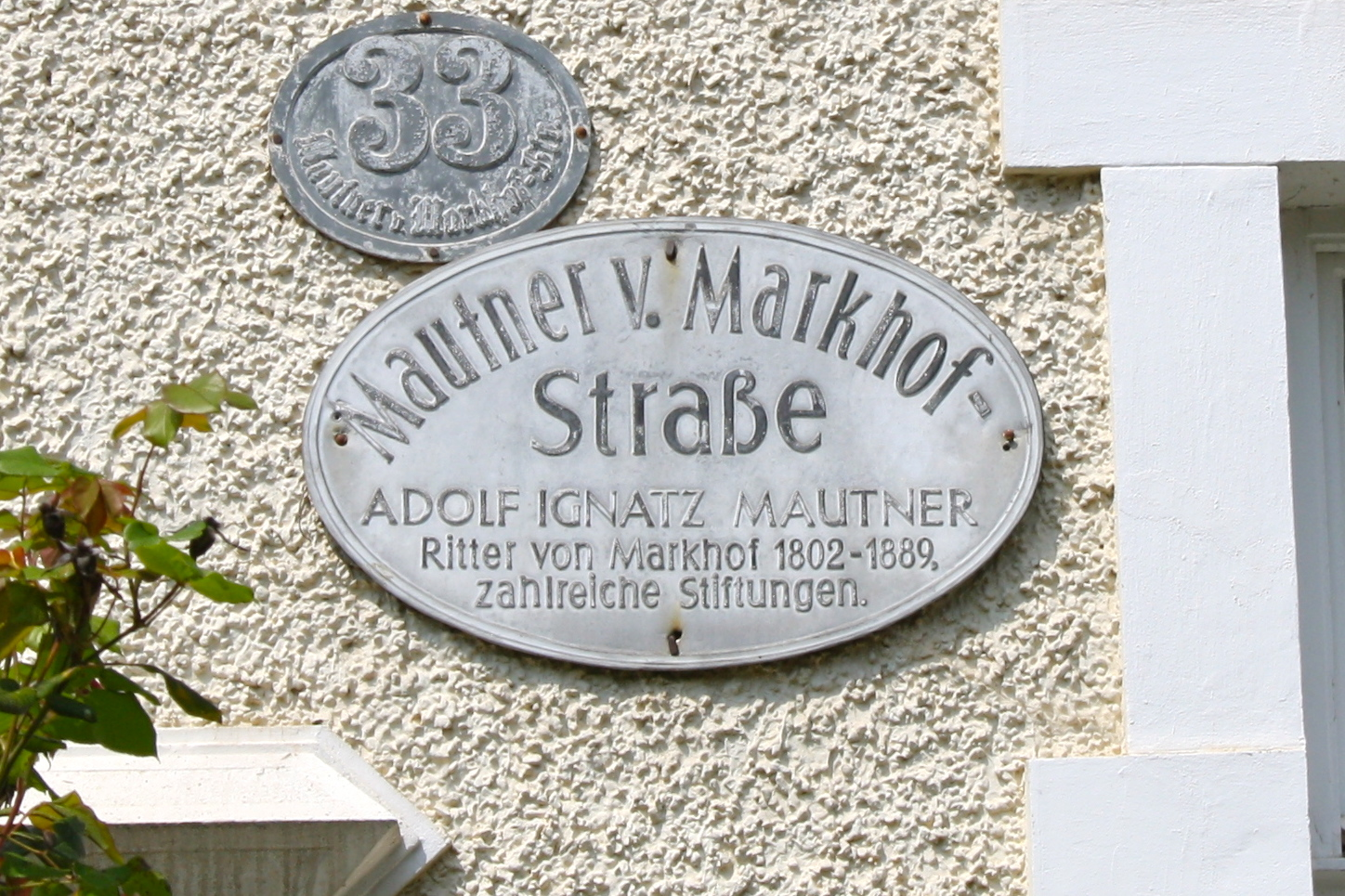 Straßenschild der Mautner-von-Markhof-Straße in Baden, Niederösterreich.